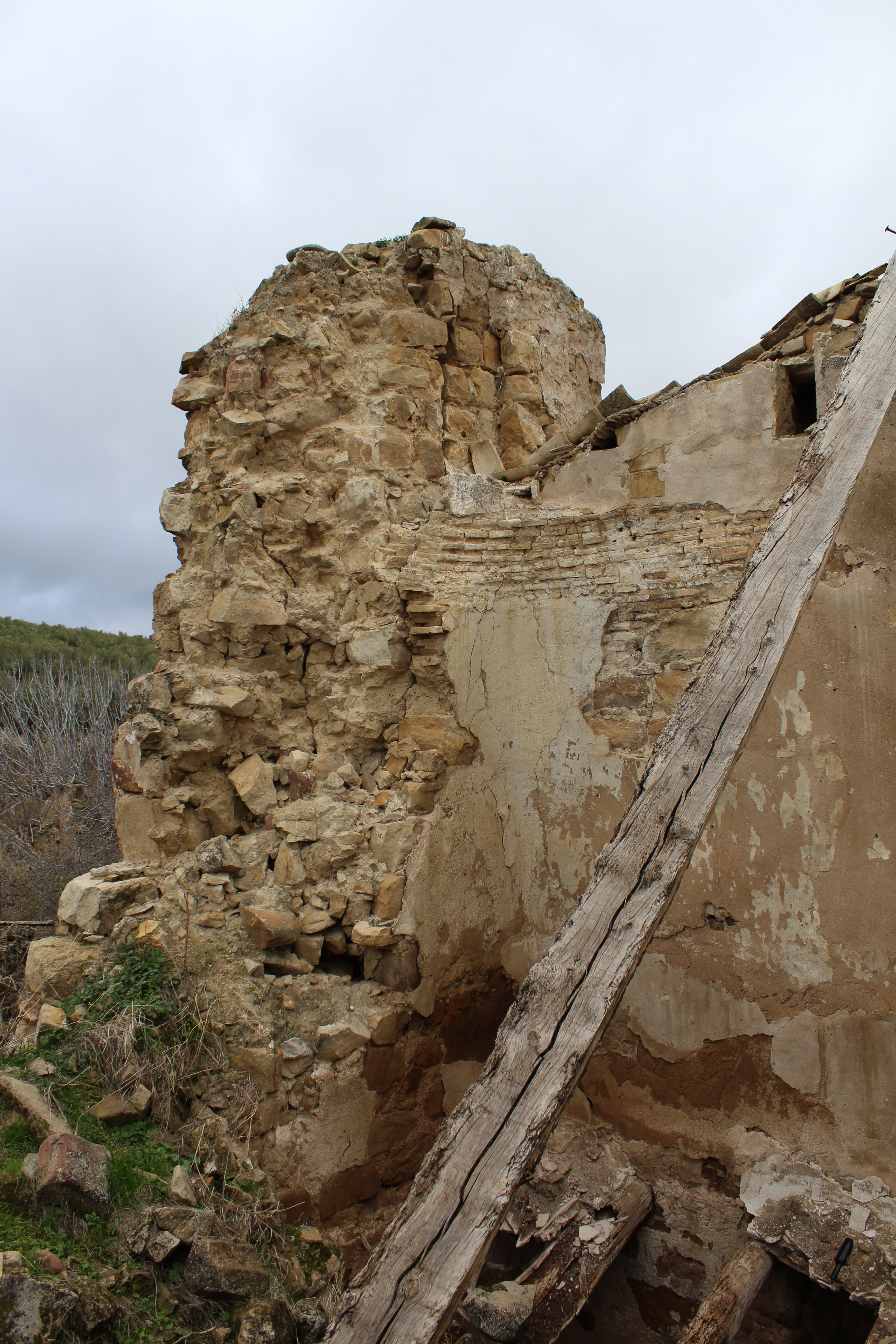 Muro de mampostería sólida de la Torre de Macarena.